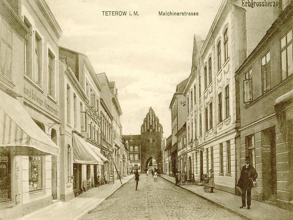 Teterow Malchiner Straße, Postkarte